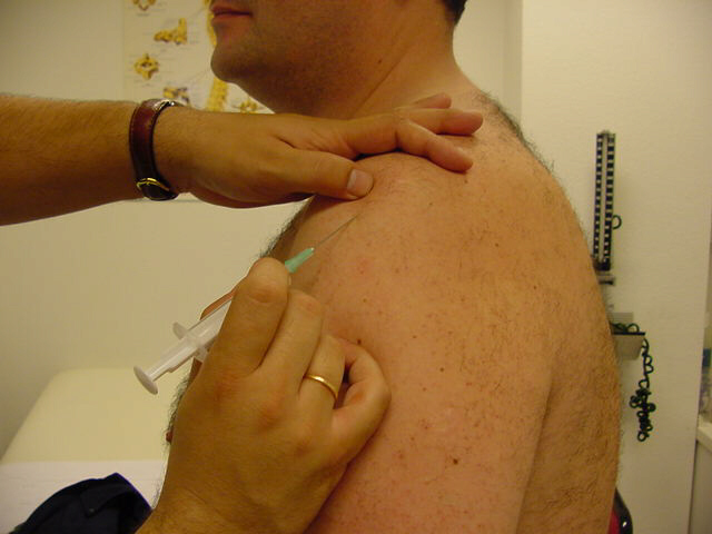 Infiltración de Hombro